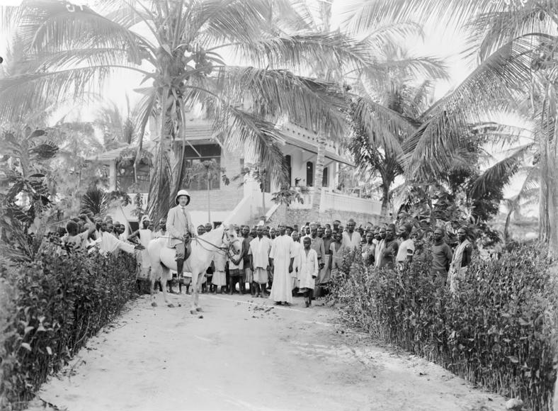 Ein Pflanzerhaus an der Küste